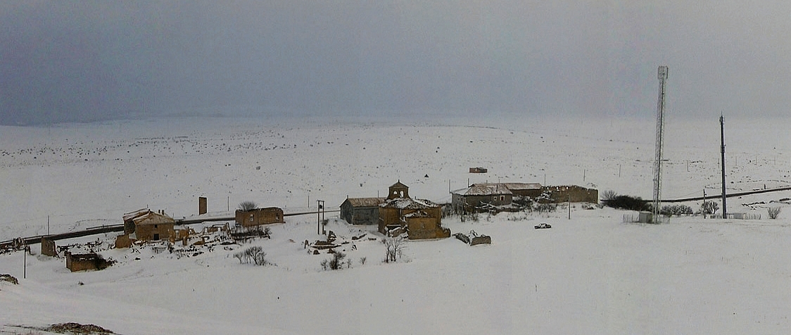 Páramo de Masa, Villata